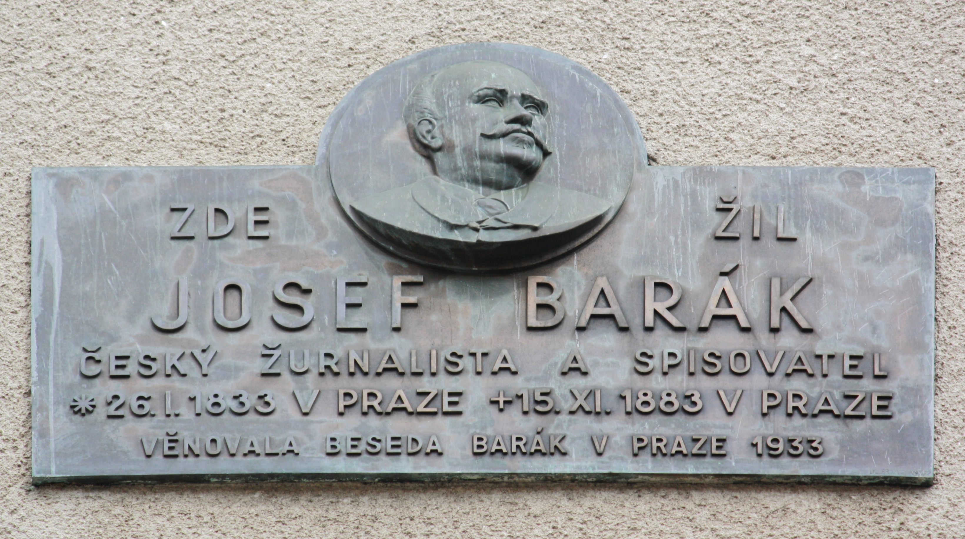 Praha, Nové Město - pamětní deska Josefa Baráka ve Spálené ulici